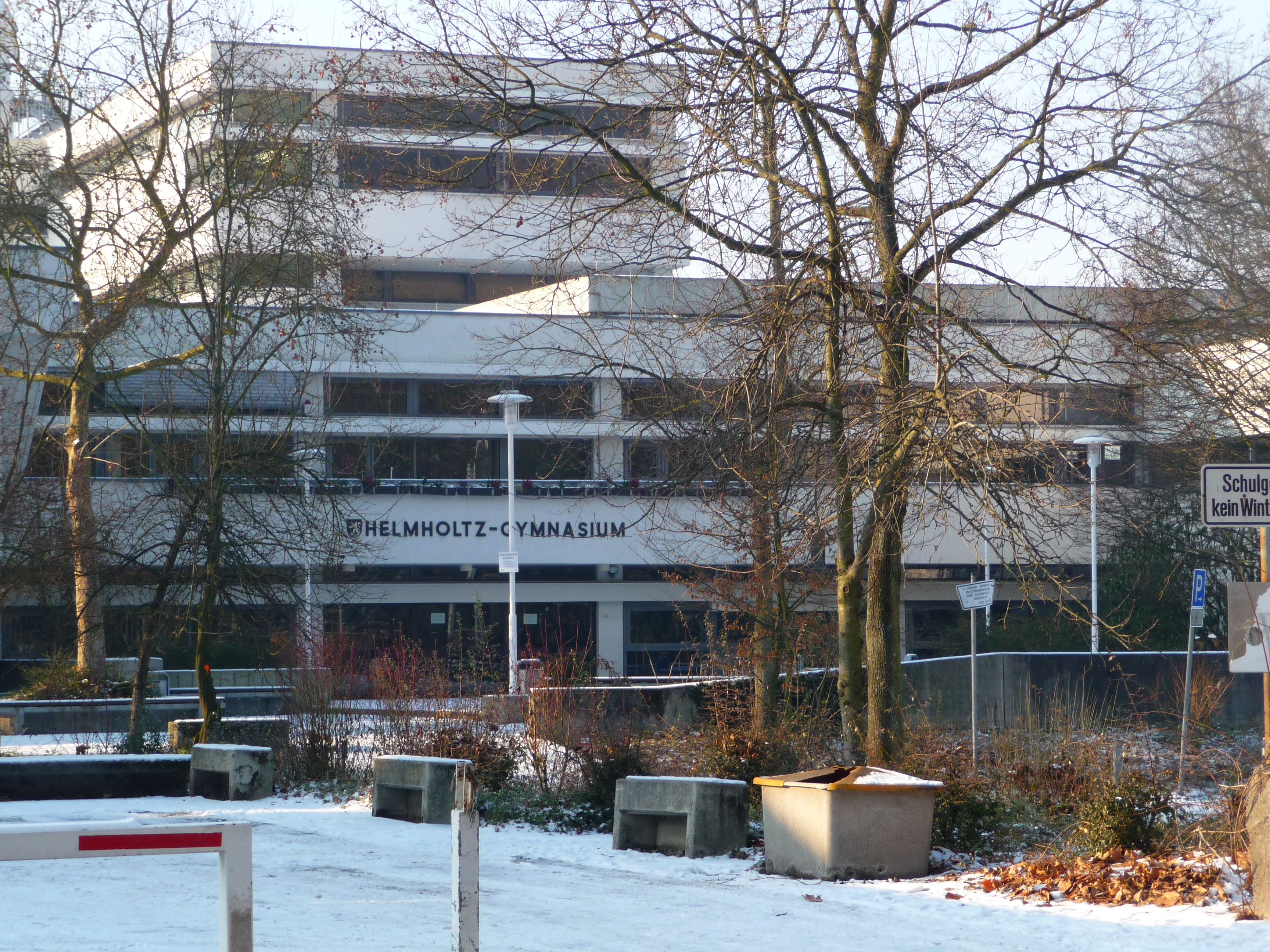 Heidelberg - Helmholtz-Gymnasium (Sicht von Osten)